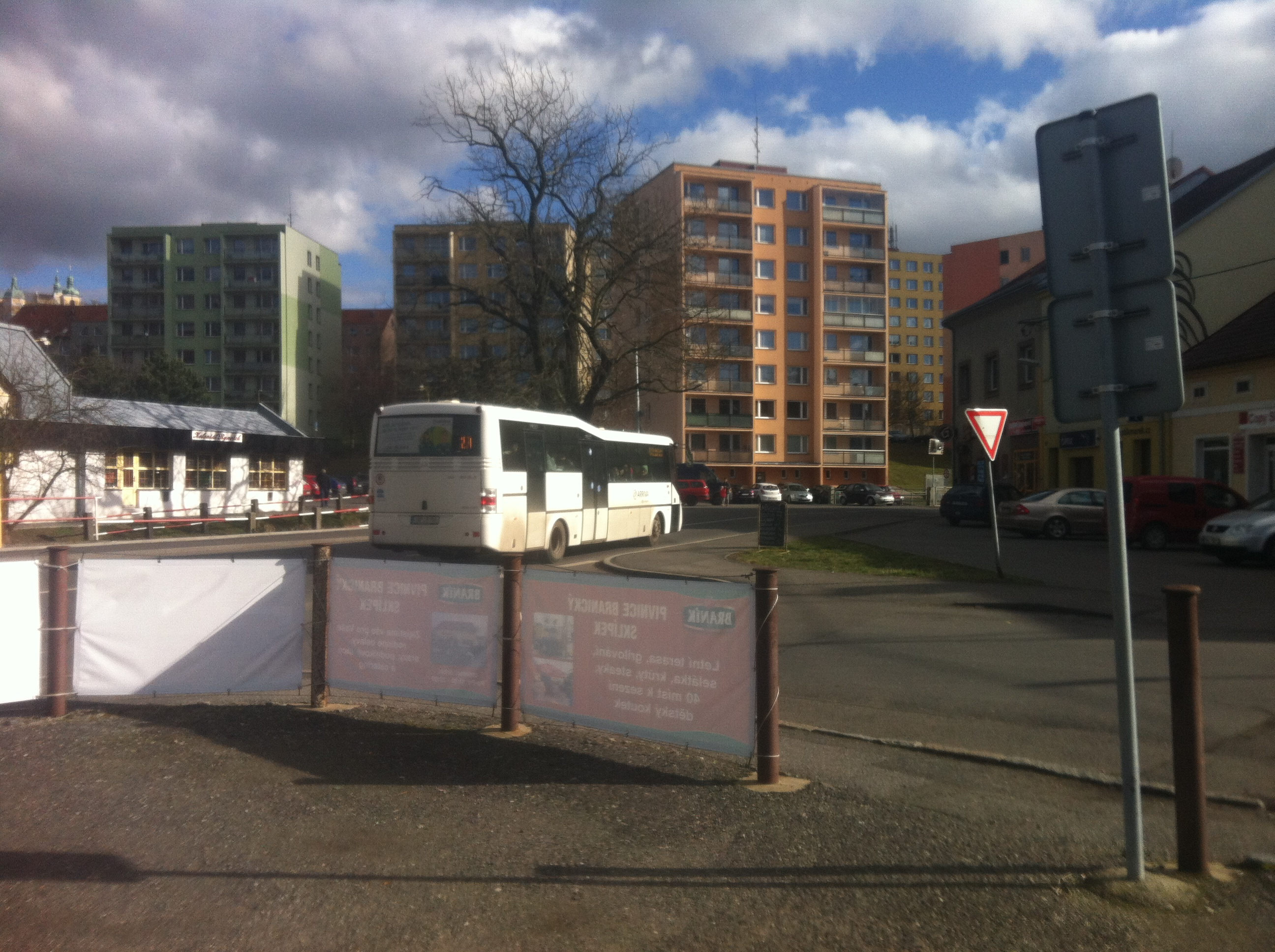 Sor BN 10.5 MHD Pb linka 2A